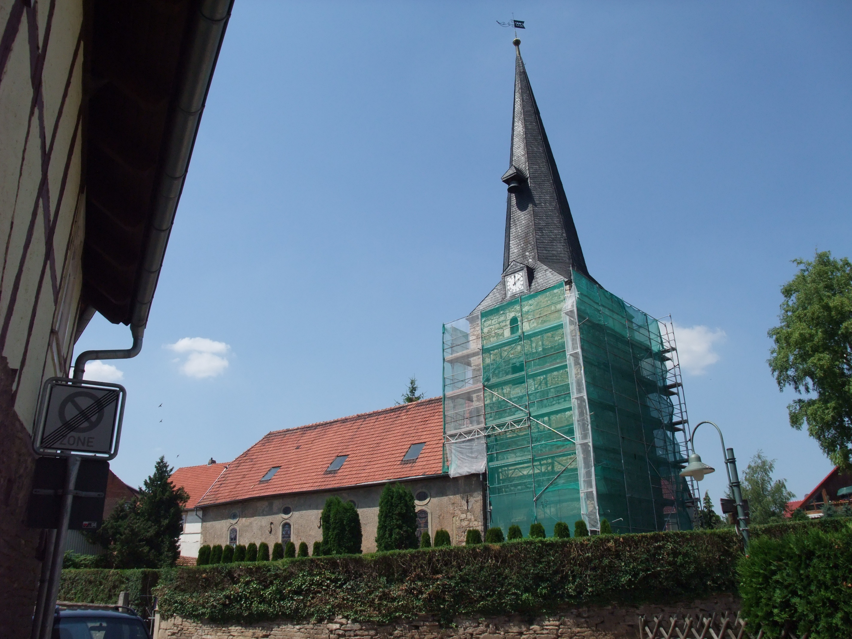 Kirche St. Georg in Großgrabe, Grabe, Deutschland.